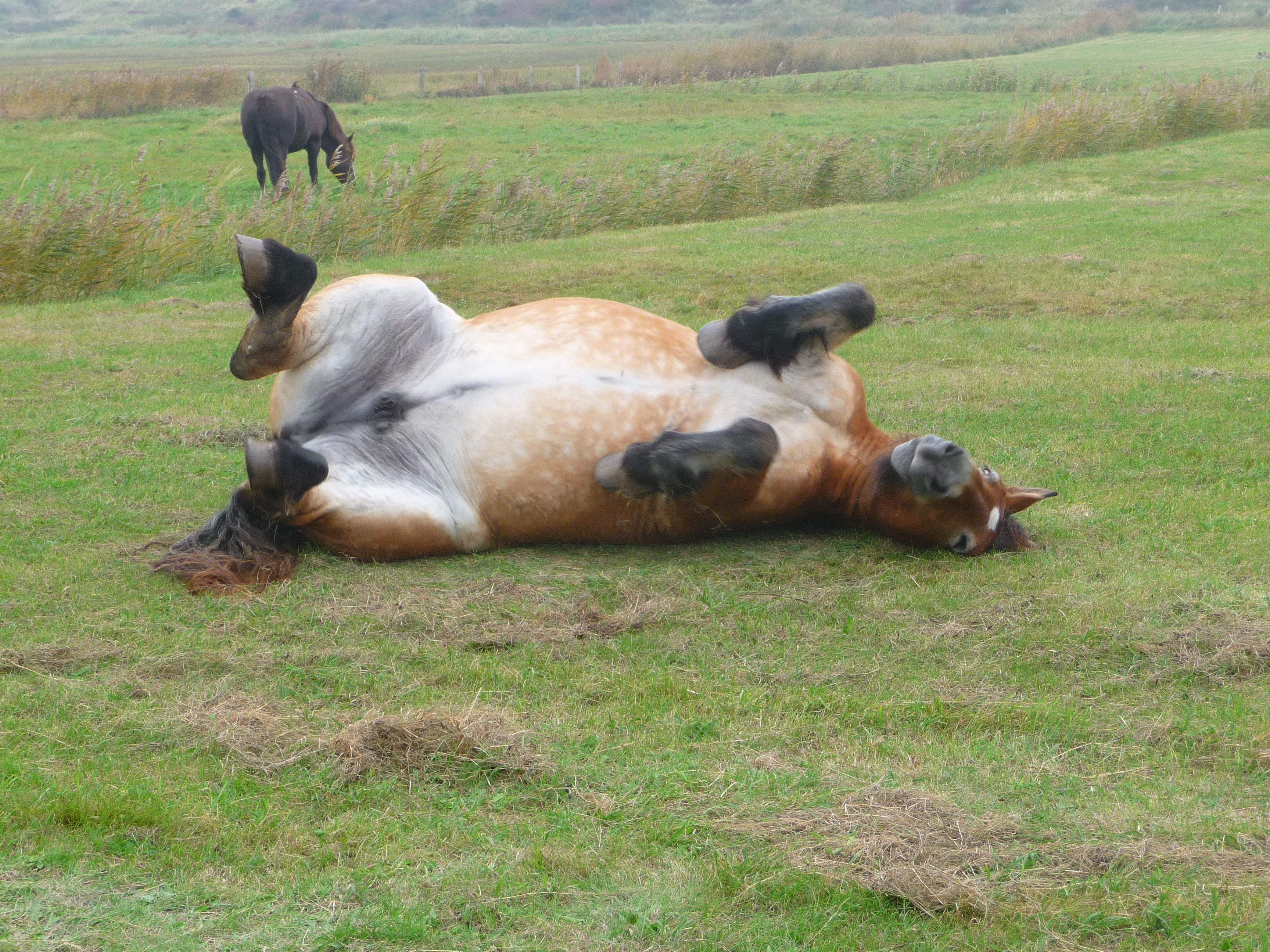 Relaxendes Kaltblut beim Weidegang, aufgenommen auf der ostfriesischen Nordseeinsel Juist (Niedersachsen, Deutschland)